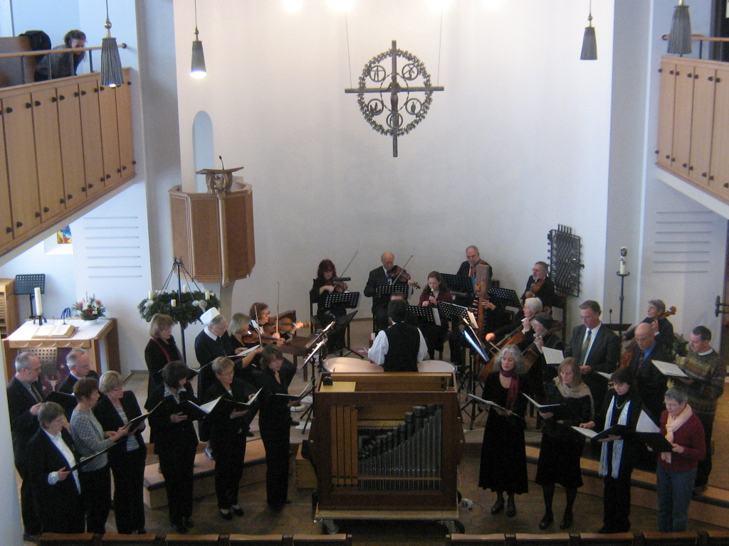 kreuznacher-diakonie-kantorei (conductor Helmut Kickton) in public concert (Marc Antoine Charpentier: Te Deum)